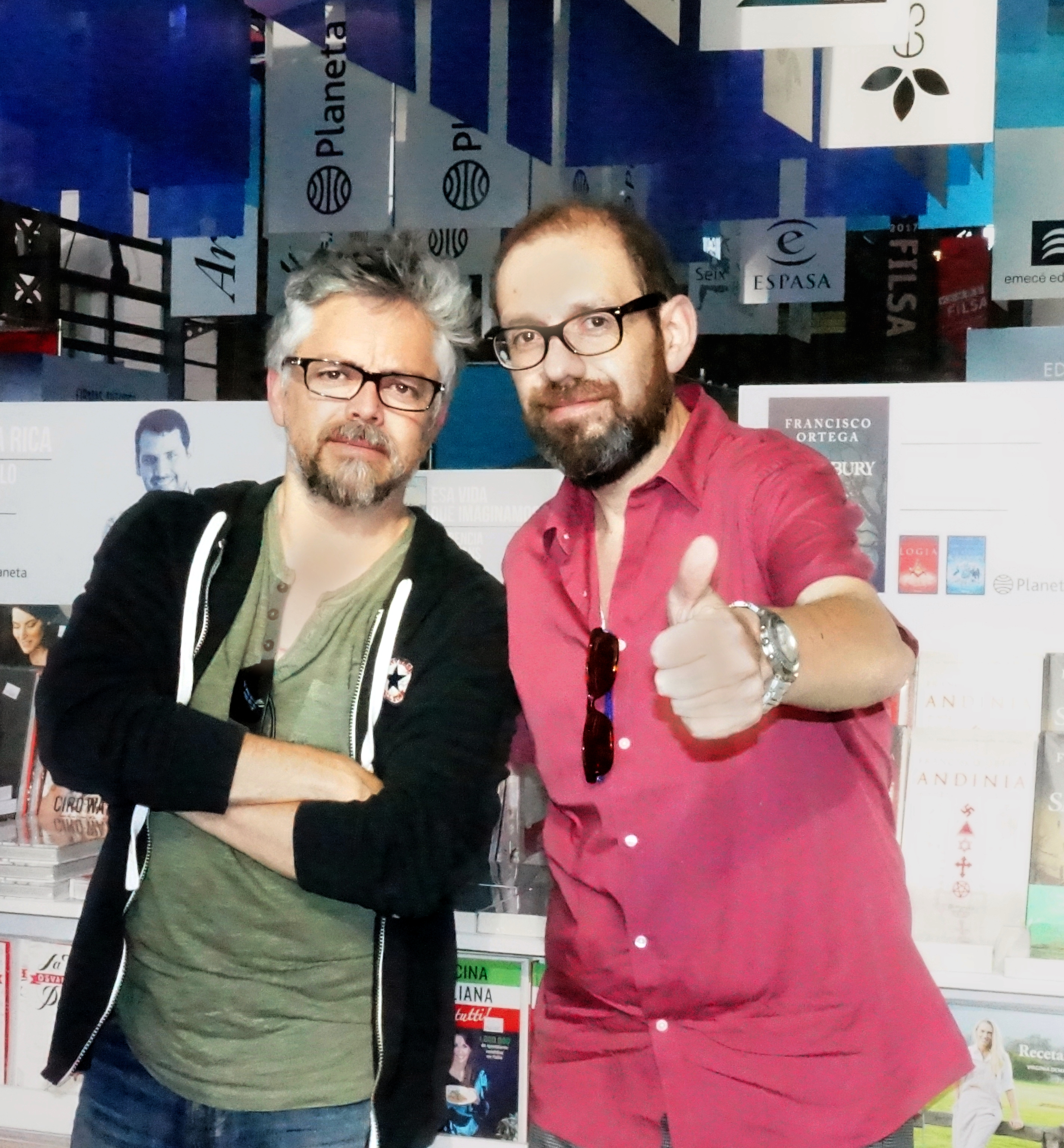 Los escritores chilenos Jorge Baradit y Francisco Ortega en la Feria Internacional del Libro de Santiago 2017. El 11 de noviembre fue la primera aparición pública de Ortega después del accidente que sufrió en una lancha de la Armada en septiembre (en algunas fotos se pueden ver las muletas que usa) y de la úlcera que tuvo después.